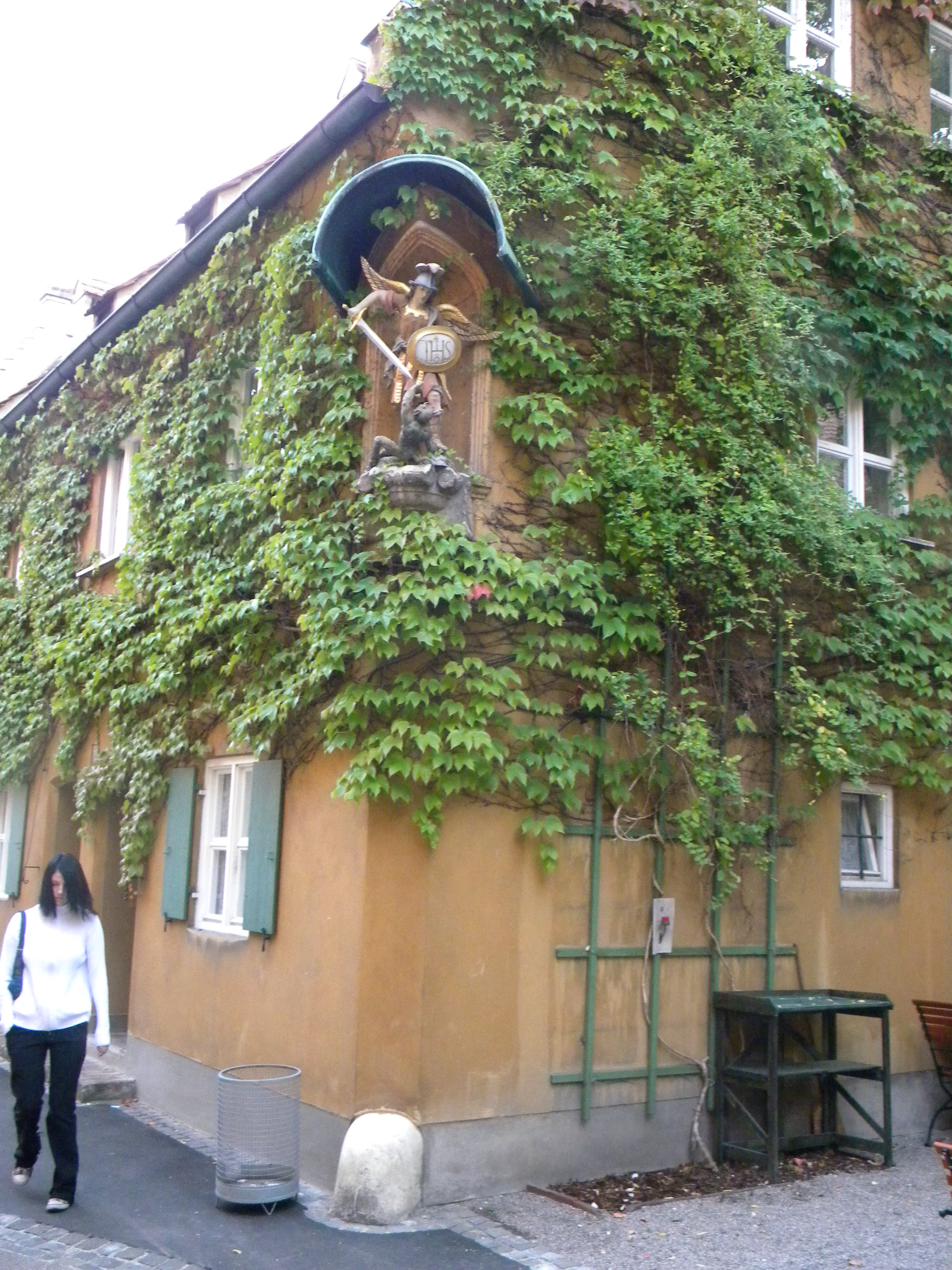 Дом в Фуггерай